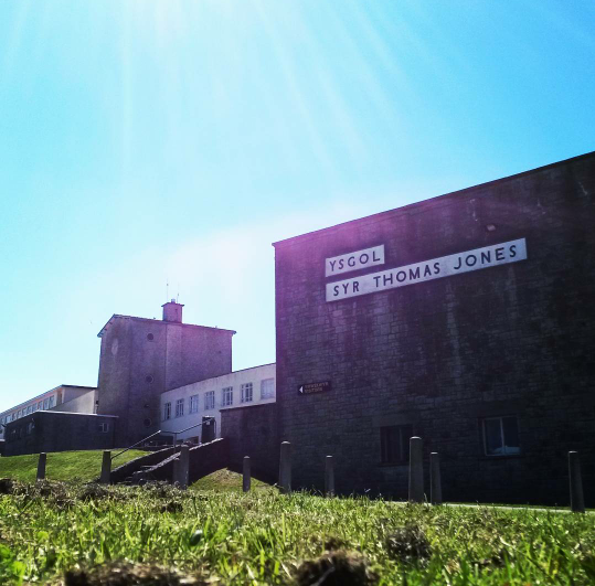 Adeilad yr ysgol